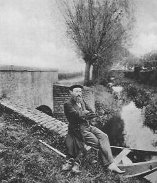 Der Moerser Lehmpastor Felke um 1900 Scan von Postkarte im eigenen Besitz